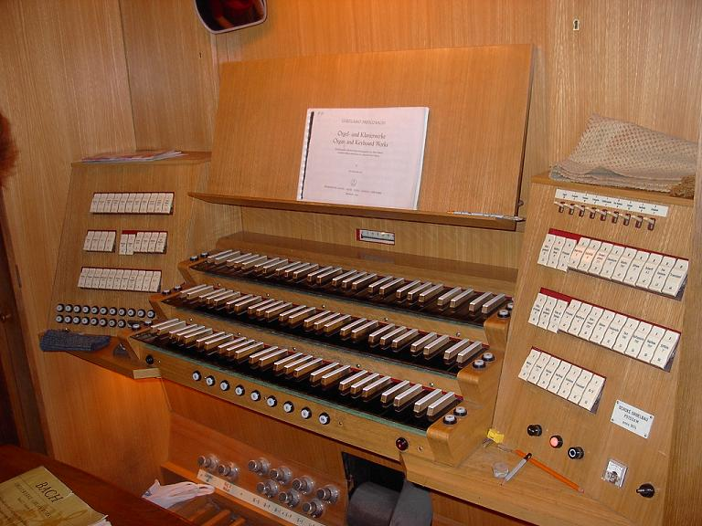 Schuke spieltisch - Bulgaria Hall